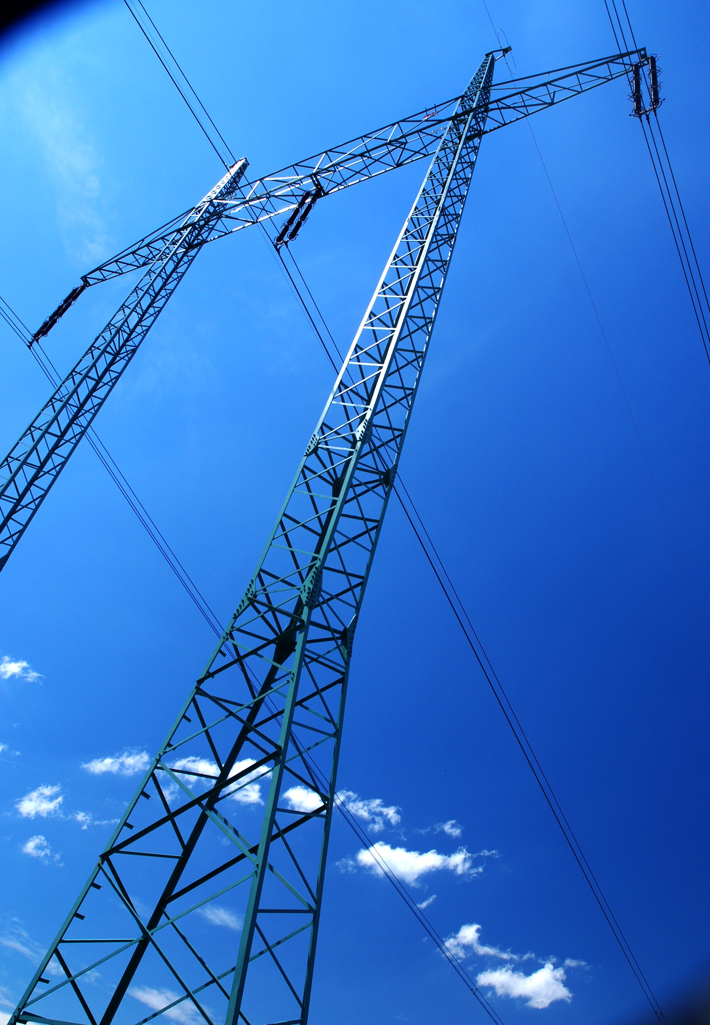 Vedení vysokého napětí (V420)